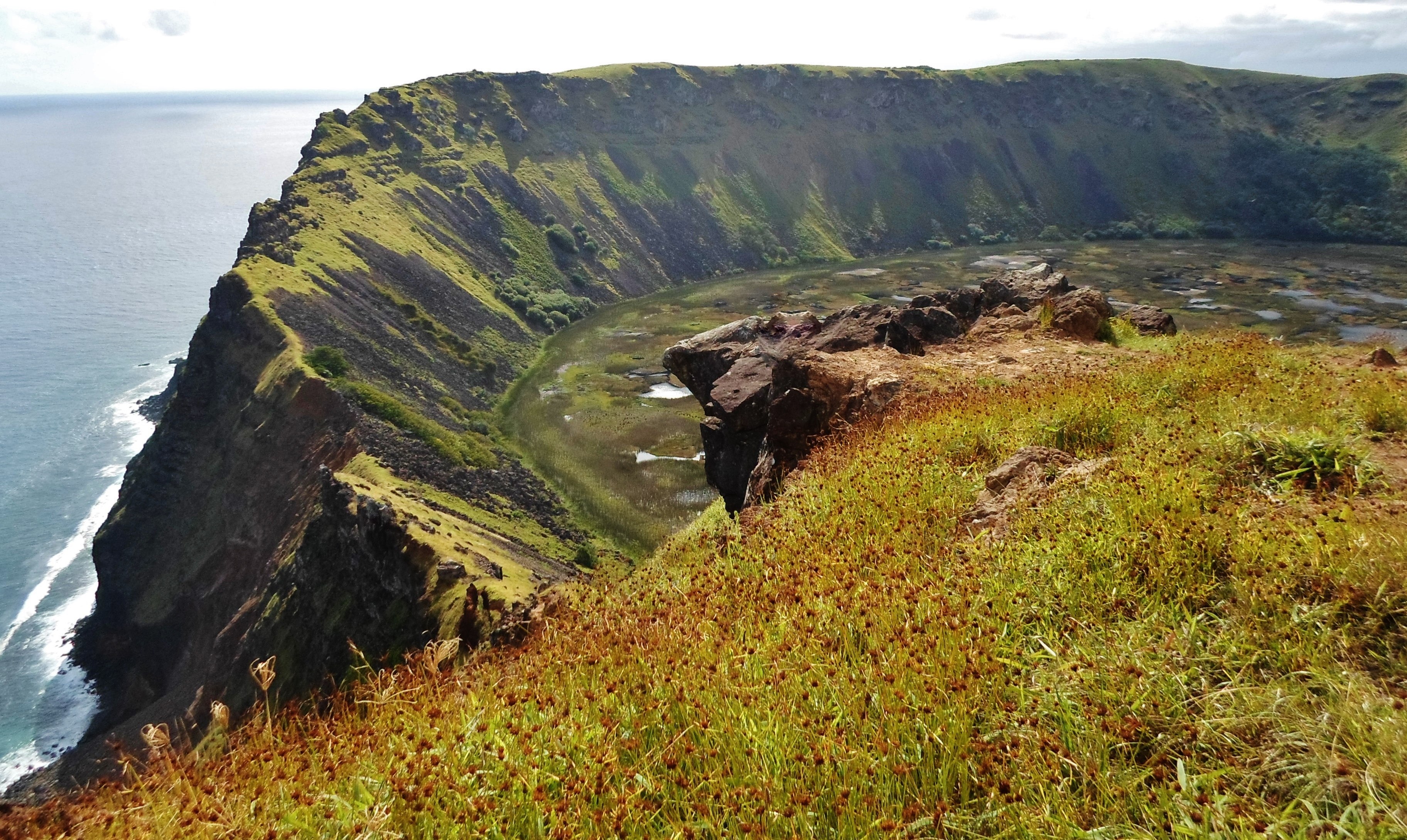 Crater del volcan rano kau, isla de pascua, chile